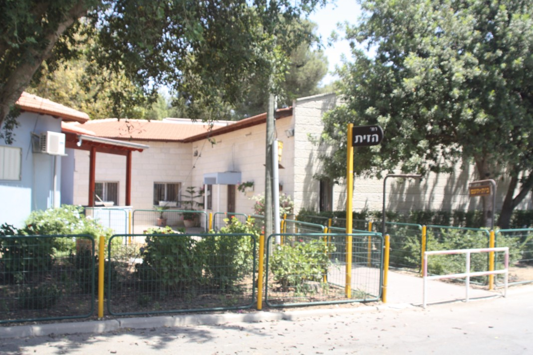 בית העם, עמינדב Bet Ha'am, Aminadav